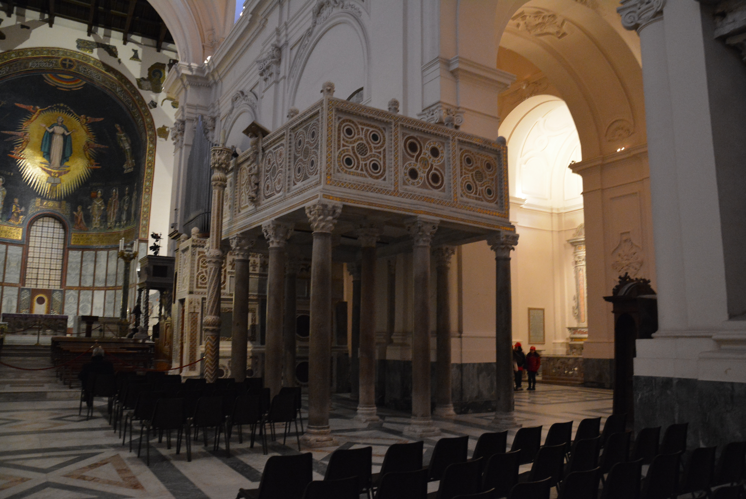 La cattedrale di Salerno